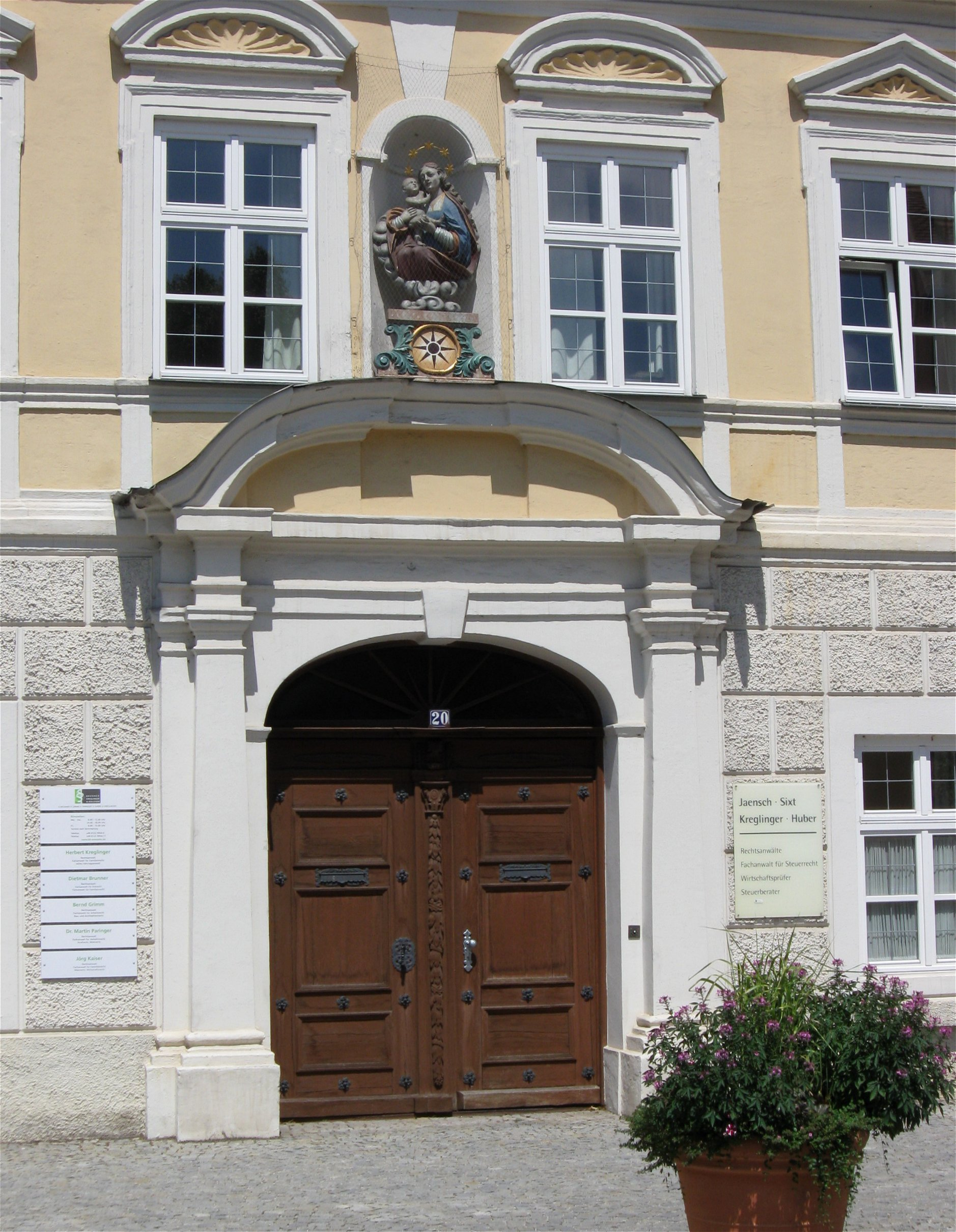 Münchner Straße 20. Palais Rivera, Wohnhaus mit hohem Giebel und Nischenfiguren, 1712, 1938 durch Brand teilzerstört (ehem. Notariat).